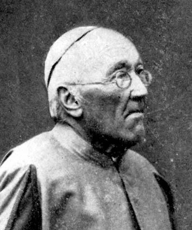 Pfarrer/Prälat Johannes Storck, 1829 - 1914, Mittelbexbach (1858 - 1869 Pfarrer), Bellheim (Pfarrer), Hermersberg, Bistum Speyer